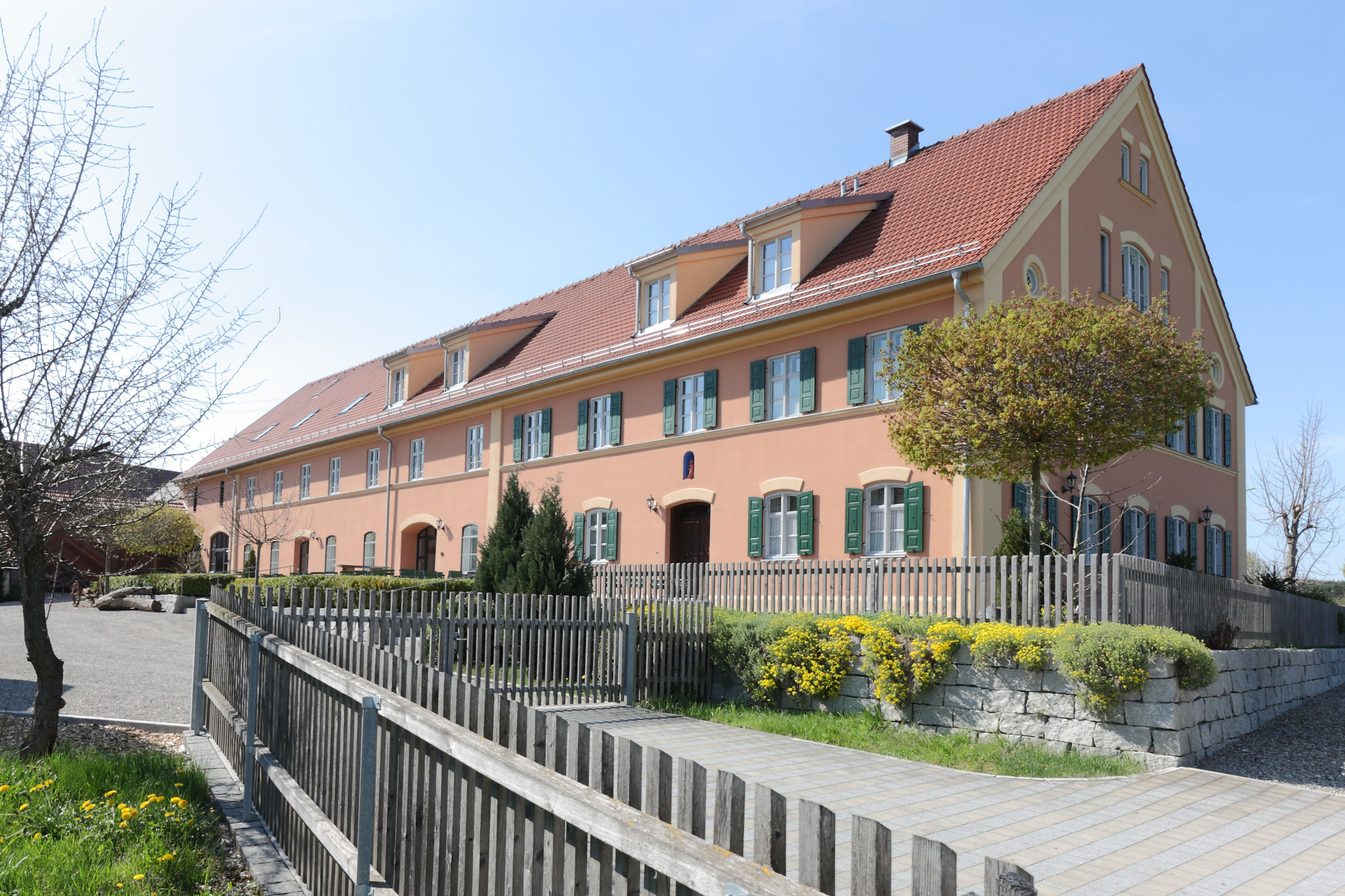 Gasthof Reiber in Bernbach, Gemeinde Aichen; Ansicht des in der 2. Hälfte des 19. Jh. erbauten Gasthauses aus Südosten